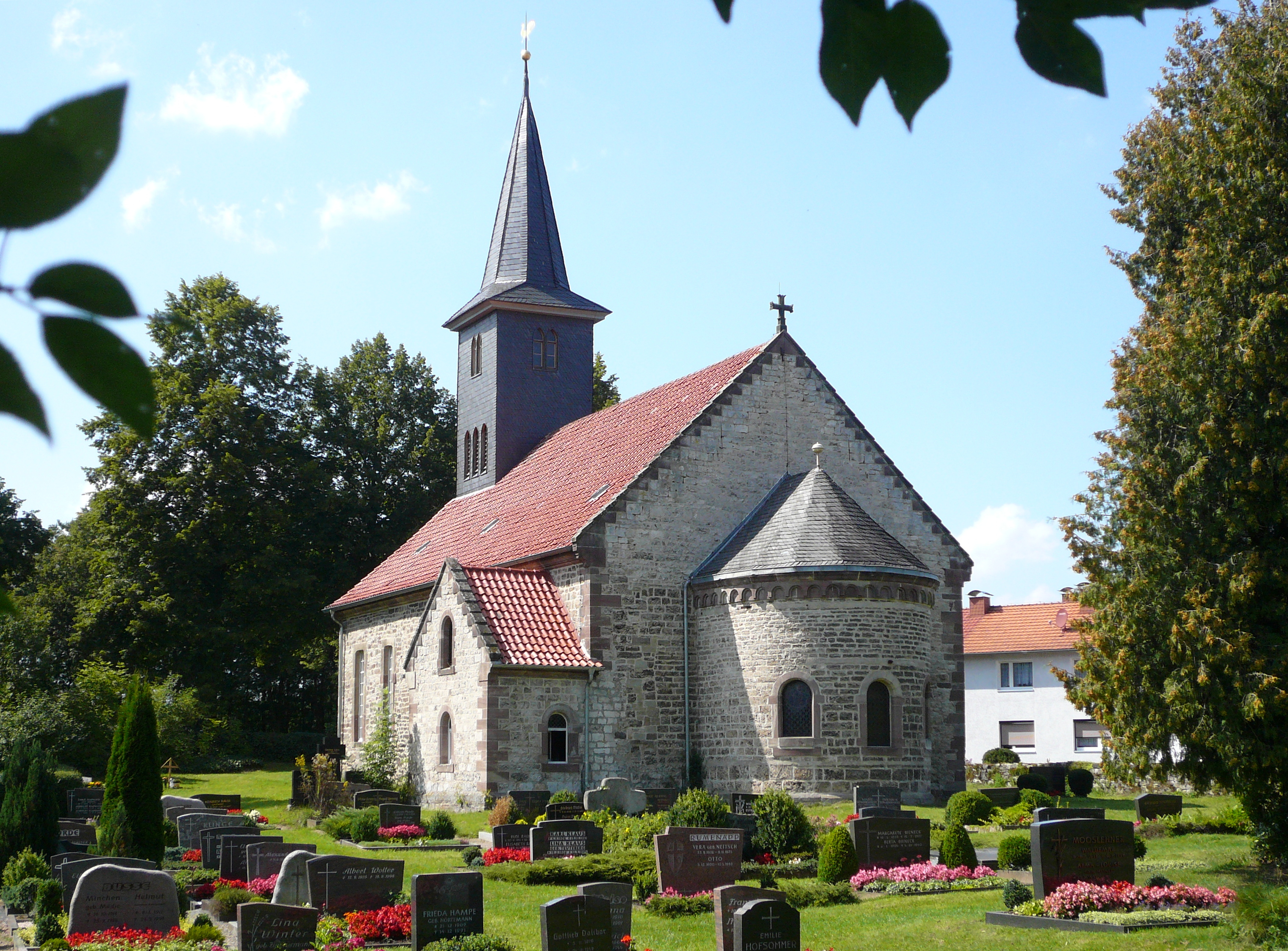 Ev.-luth. Pfarrkirche St. Vitus auf dem Kirchberg in Erbsen, Flecken Adelebsen, Landkreis Göttingen, Niedersachsen. Im Kern mittelalterlich, mehrfach umgestaltet und erweitert.